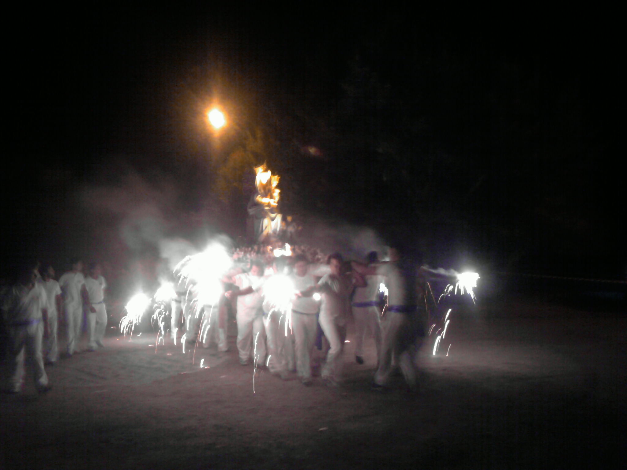 Palmi. 02/09/2012. Festa di Maria Santissima della Montagna. Fiaccolata al rientro della processione